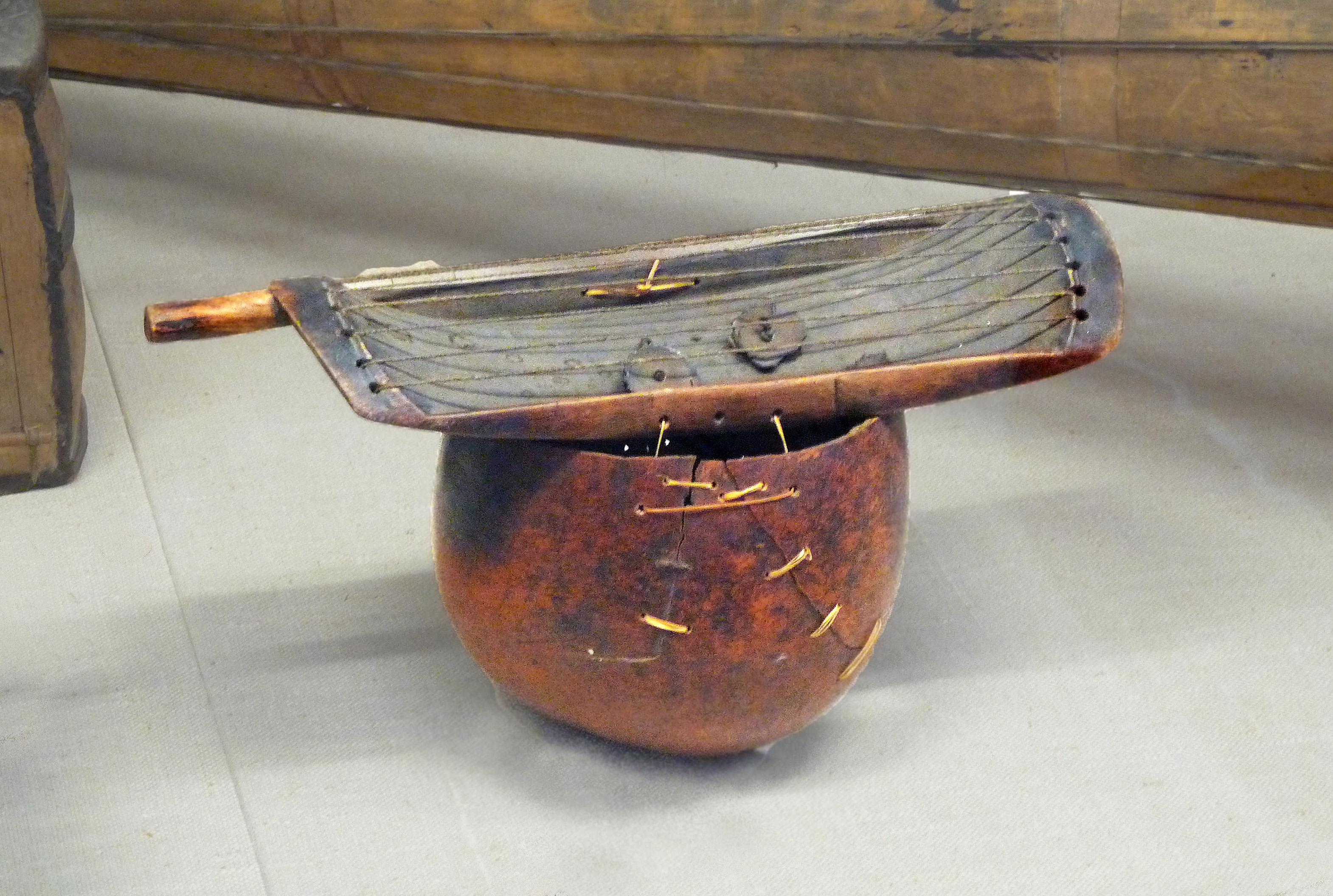 Shi : cithare en bouclier. Musée royal de l'Afrique centrale